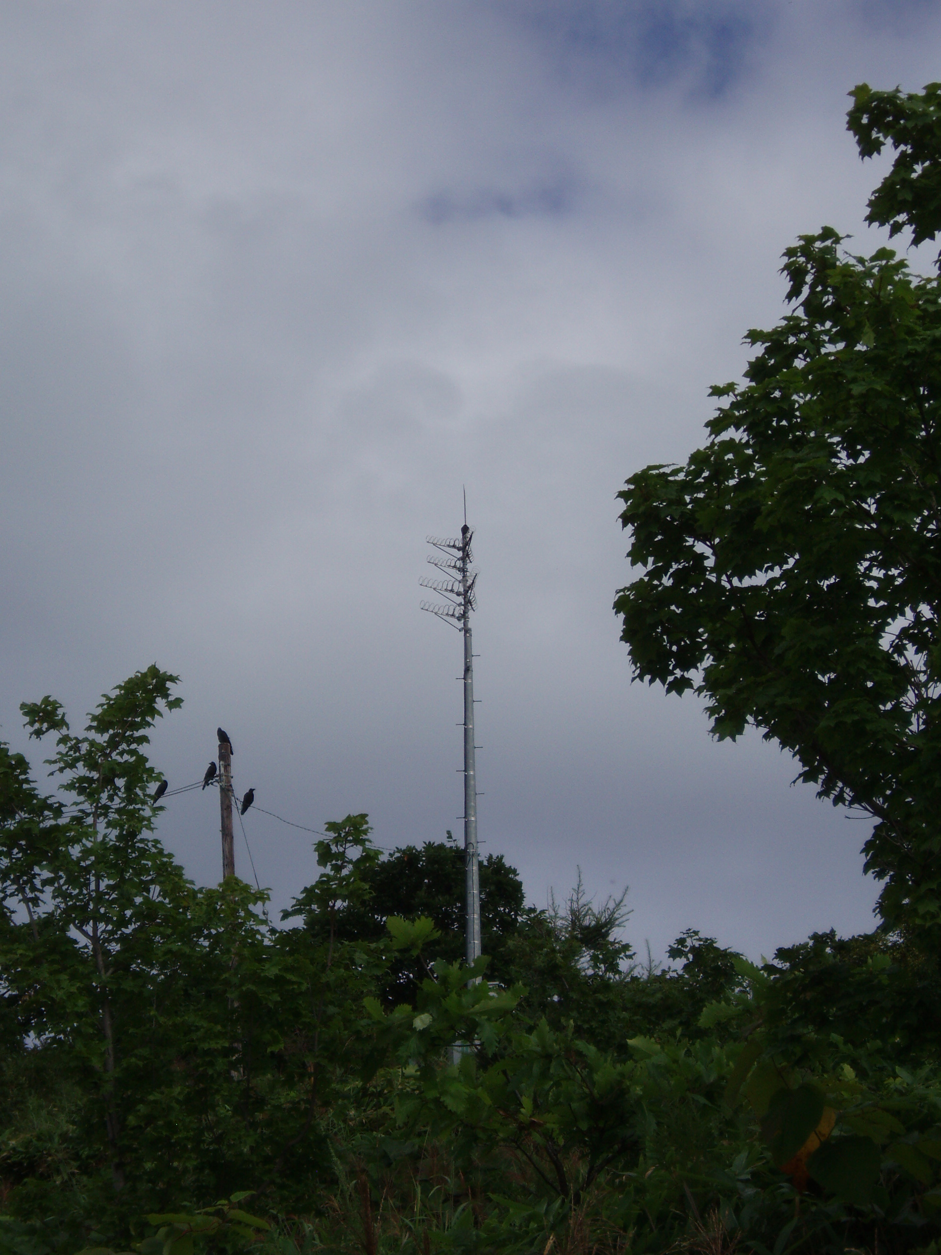 小平港中継局